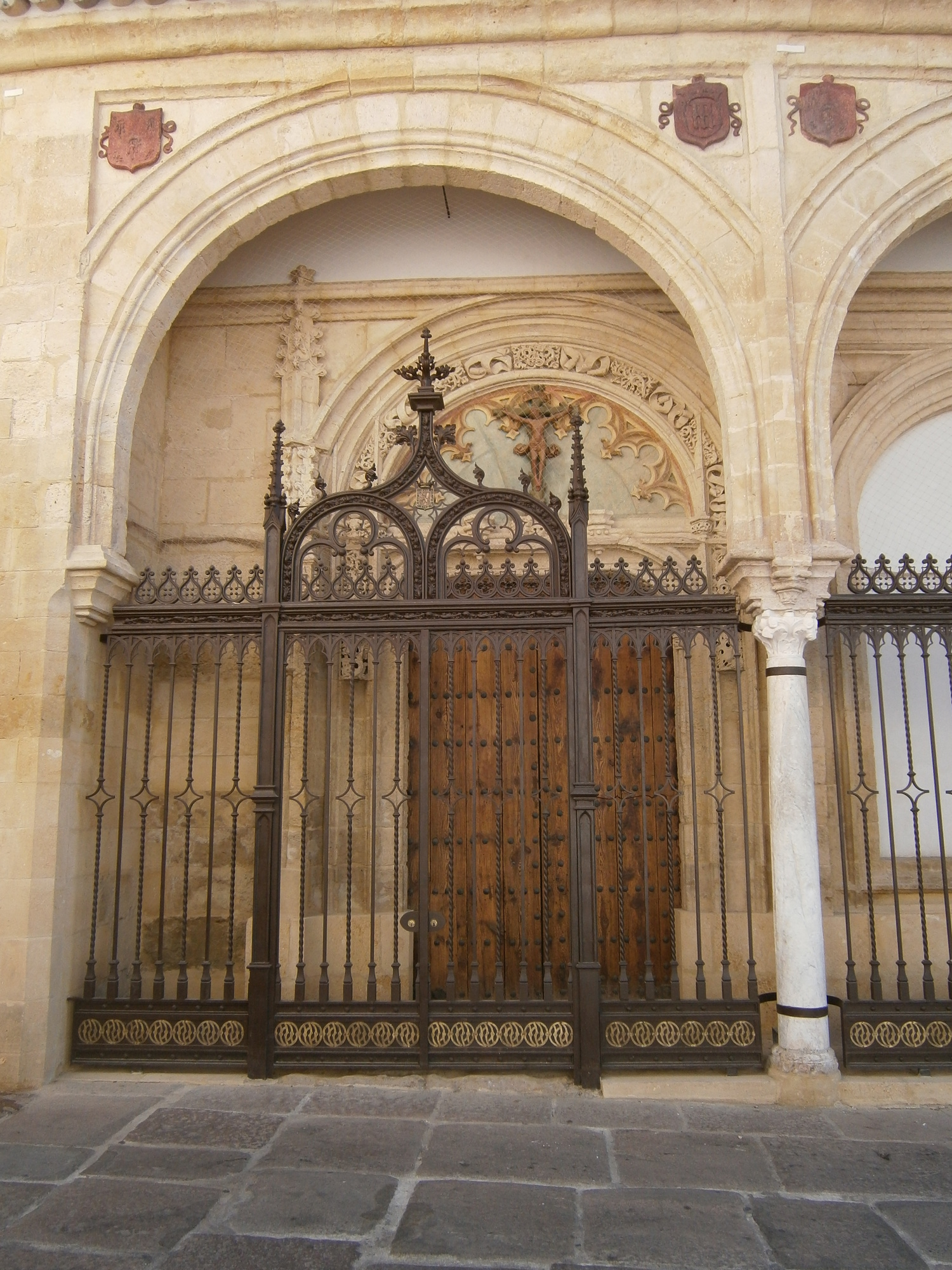 Entrada de la antigua iglesia del Hospital de la Caridad (actual museo de Bellas Artes)